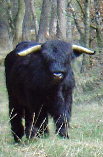 Schotse hooglander (in het Westerzand bij Wapserveen)